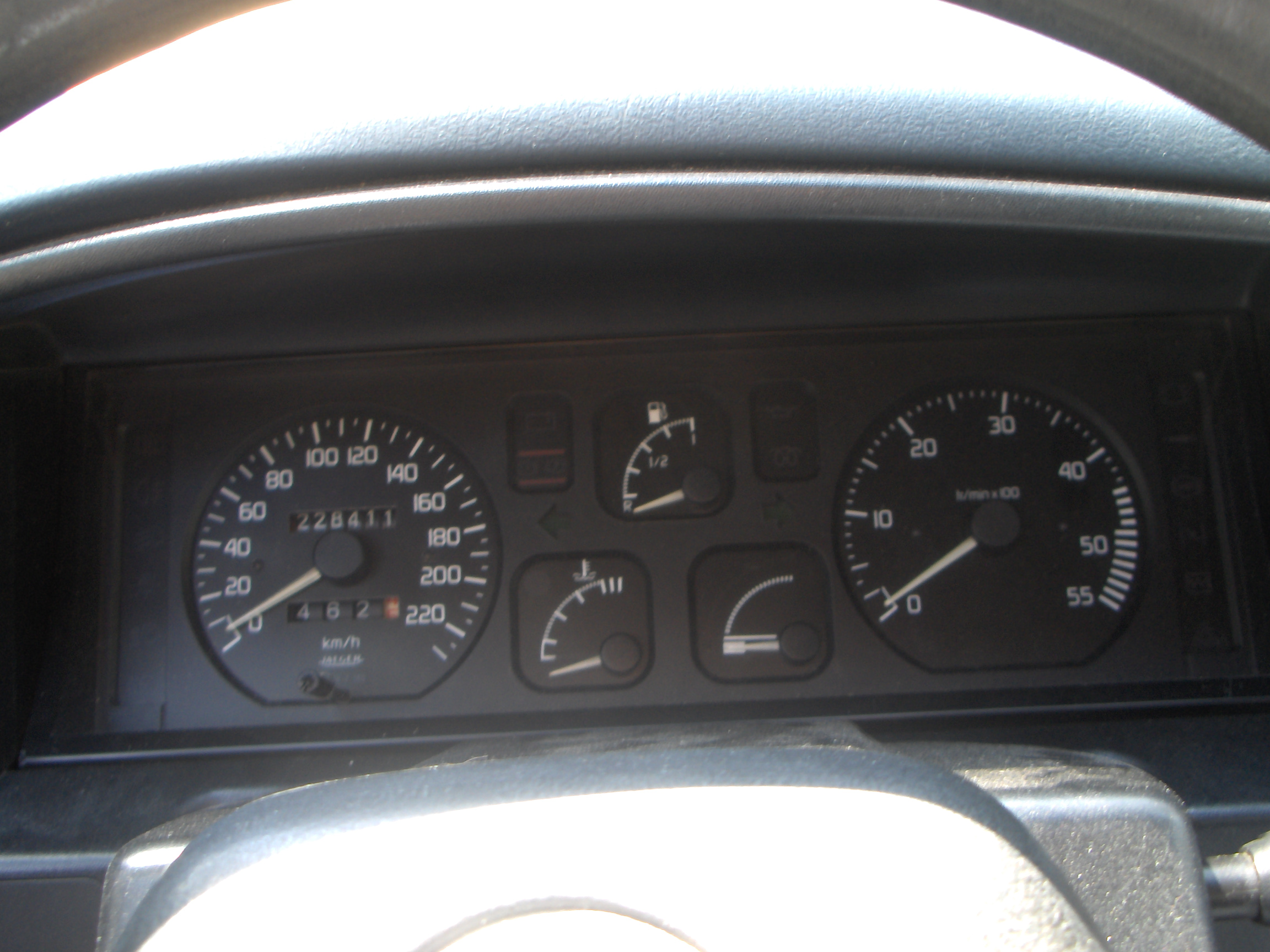 Compteur avec compte-tour de Renault 19 Phase 2